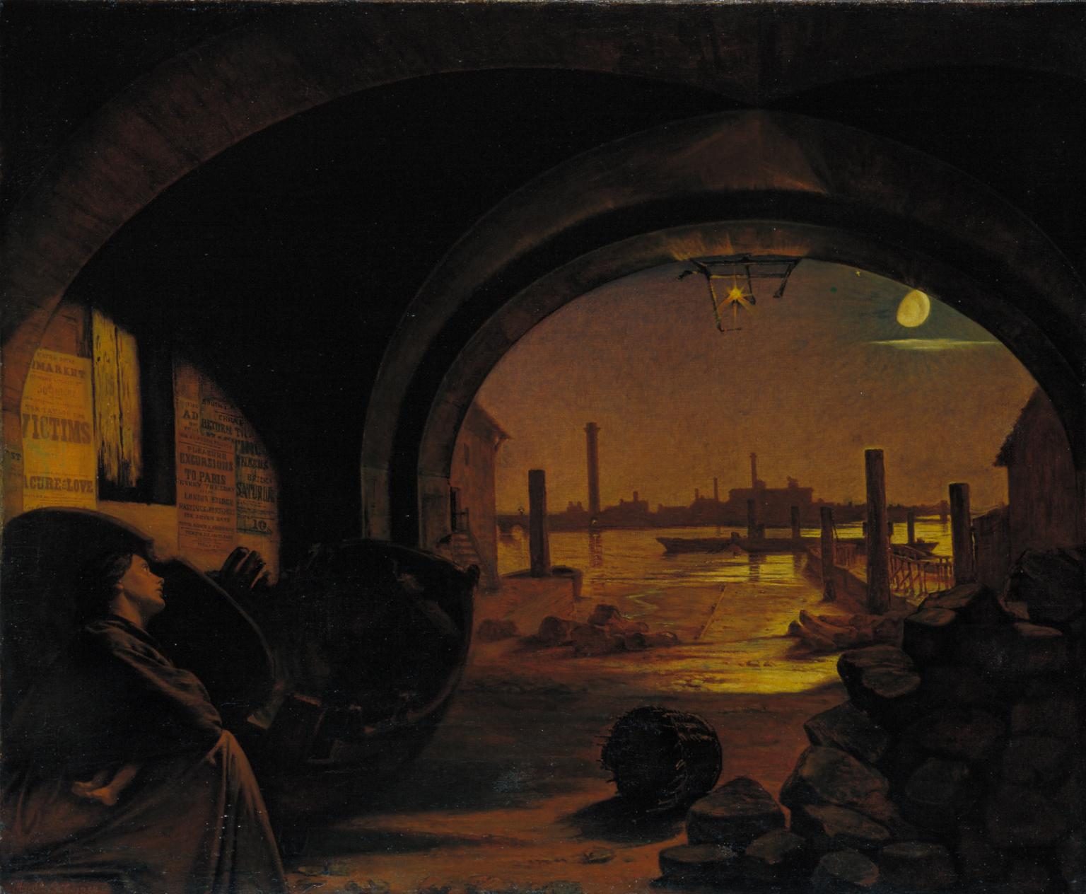 Wikipedia page